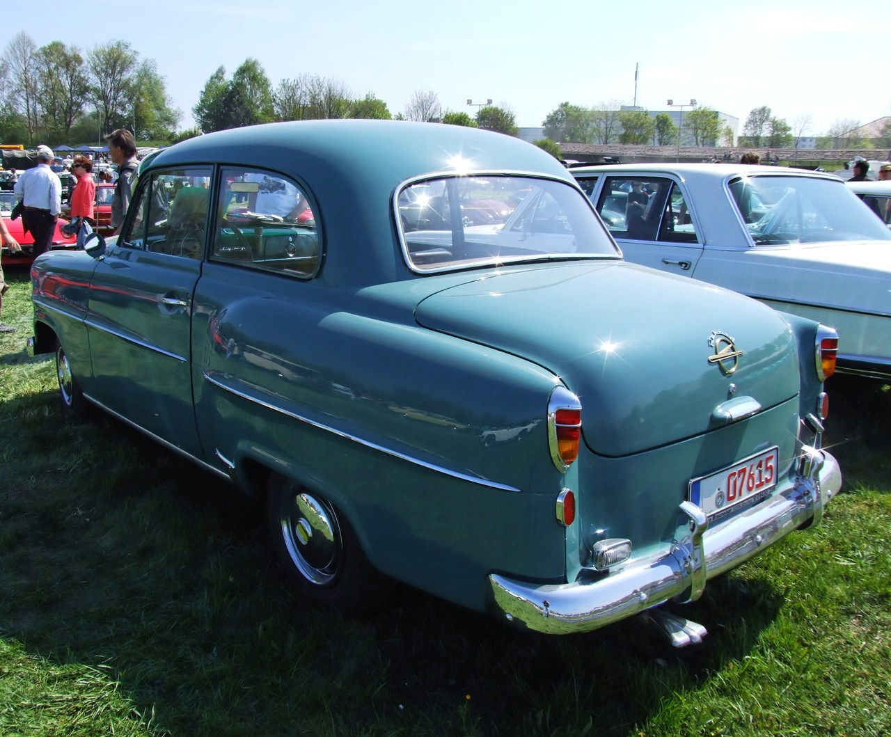 Quelle: selbst fotografiert, 04/2007 Fotograf: Späth Chr.